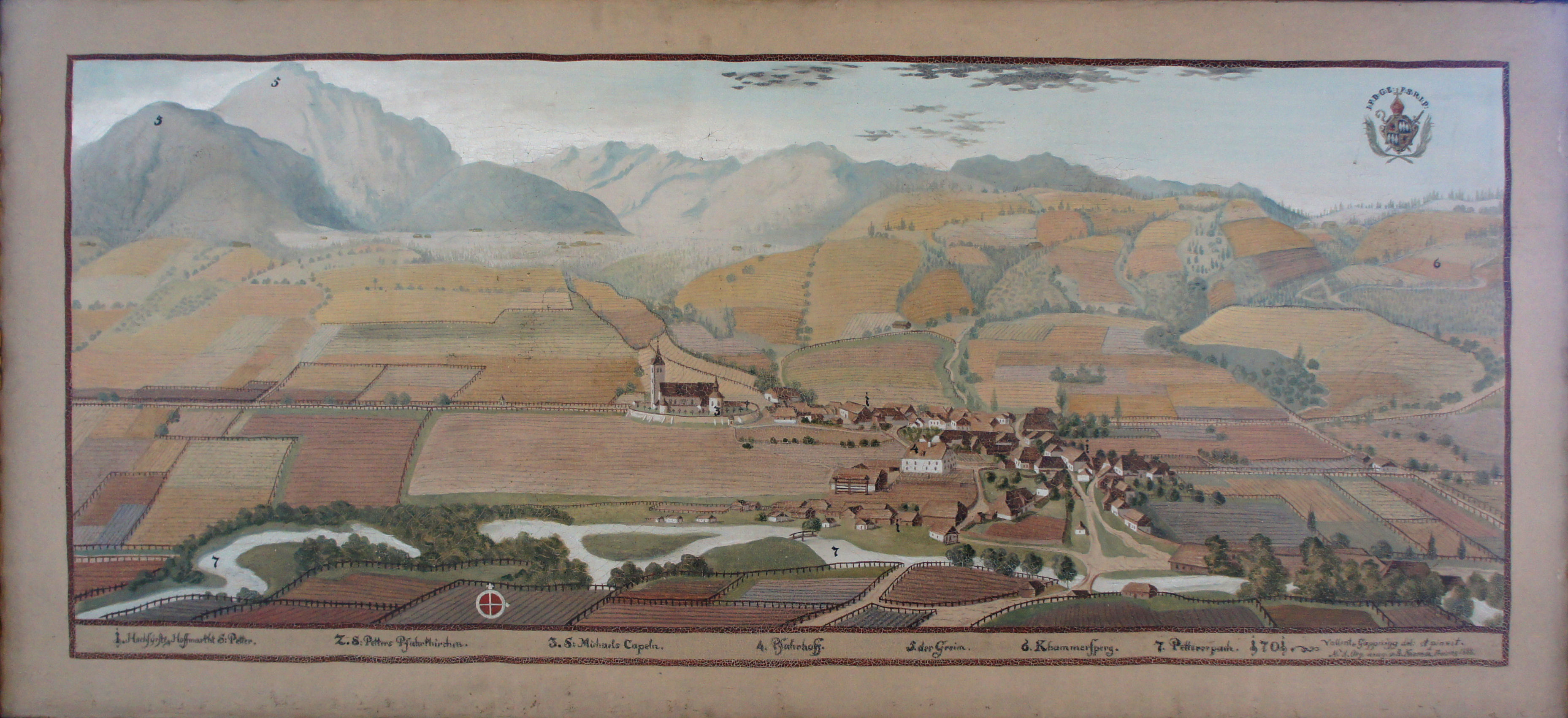 Gemälde aus einer Serie mit Darstellungen von Besitztümern des Hochstifts Freising im Fürstengang zwischen Fürstbischöflicher Residenz und Freisinger Dom.